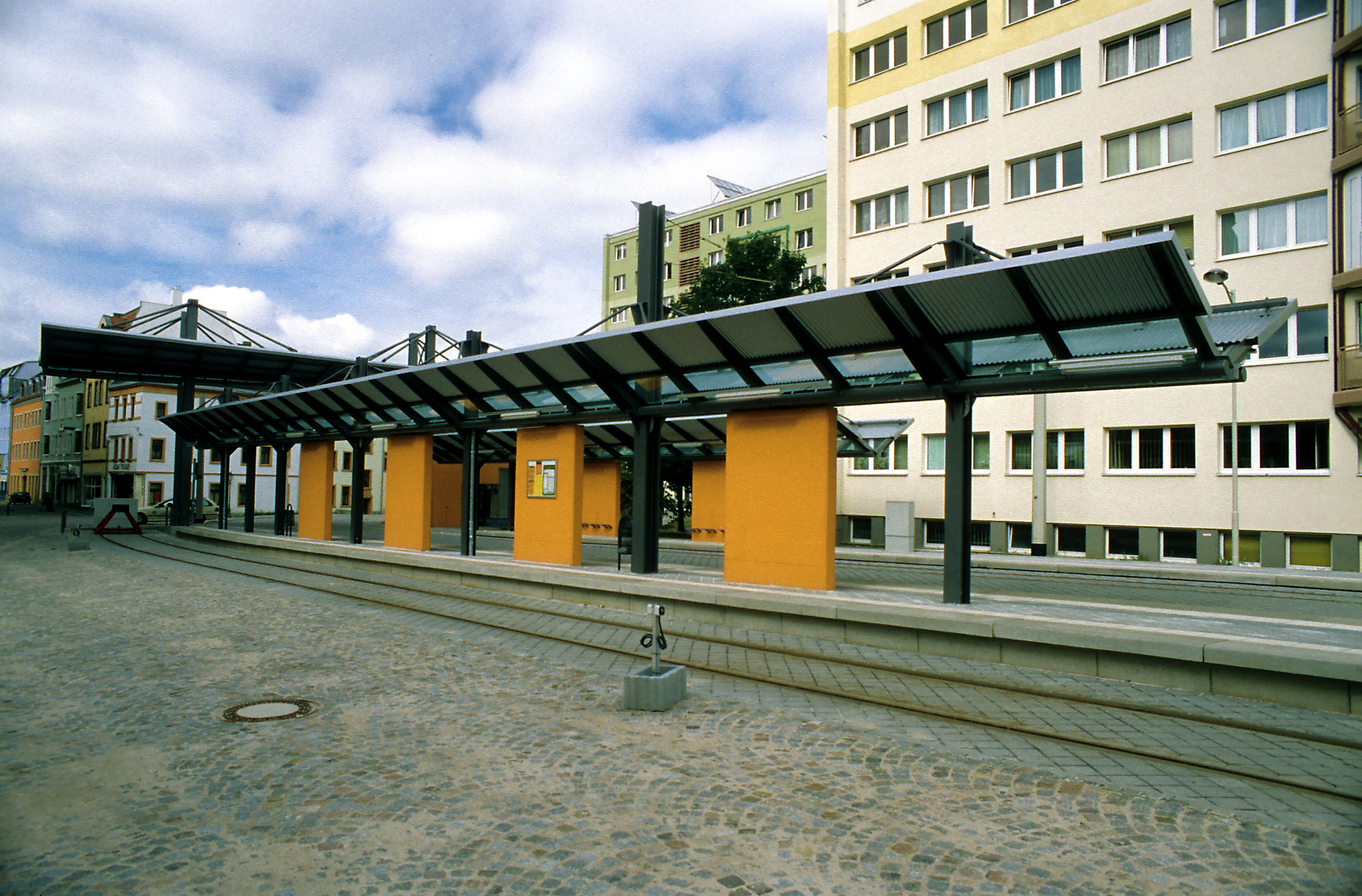 Hier enden und beginnen die Regelspurzüge.Wegen der Unterschiede bei der Fahrzeugumgrenzung sind Bahnsteigkanten für beide Systeme nicht machbar.